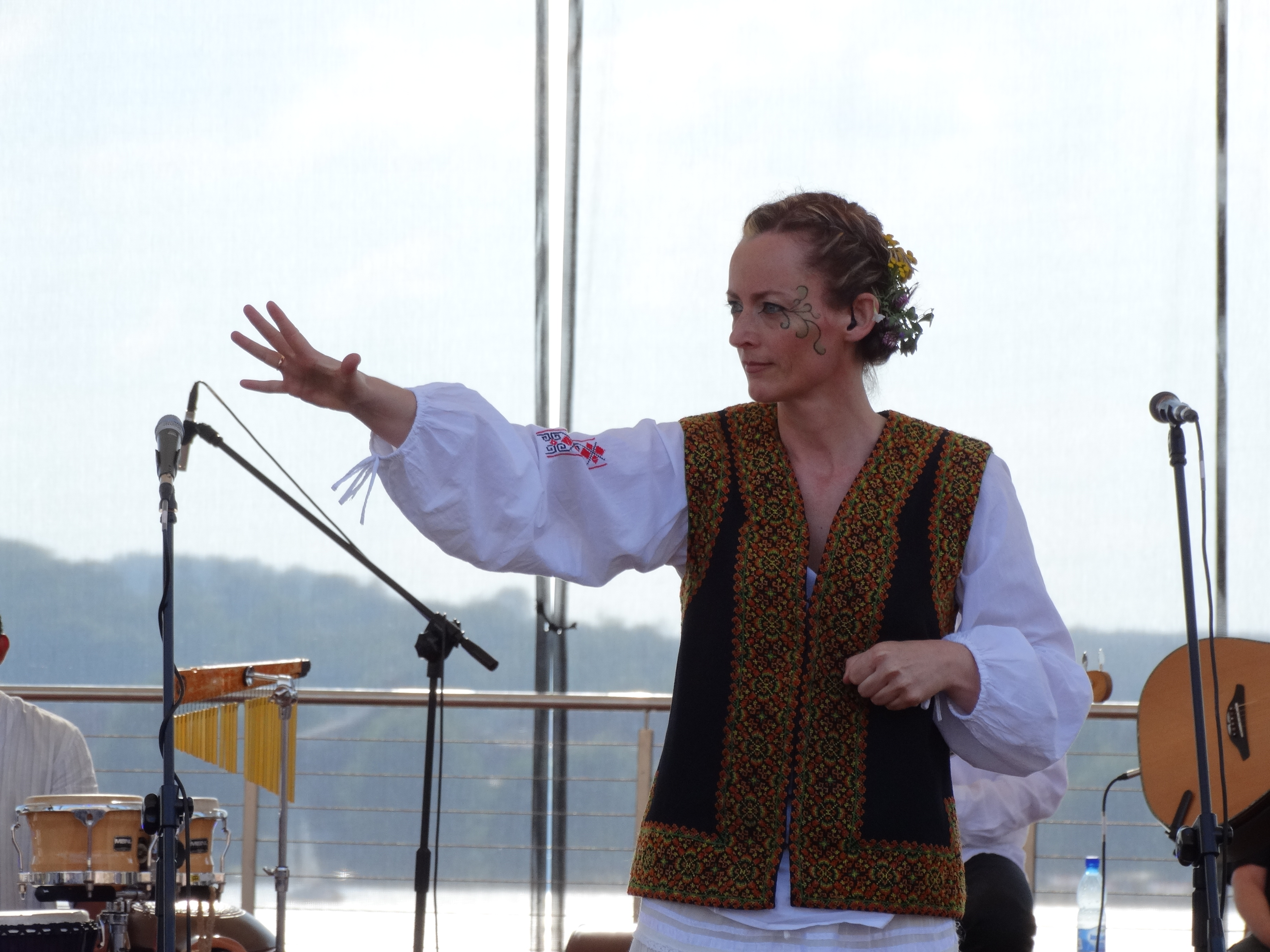 Ola Turkiewicz na koncercie Projekt Arboretum, Mrągowo 2014